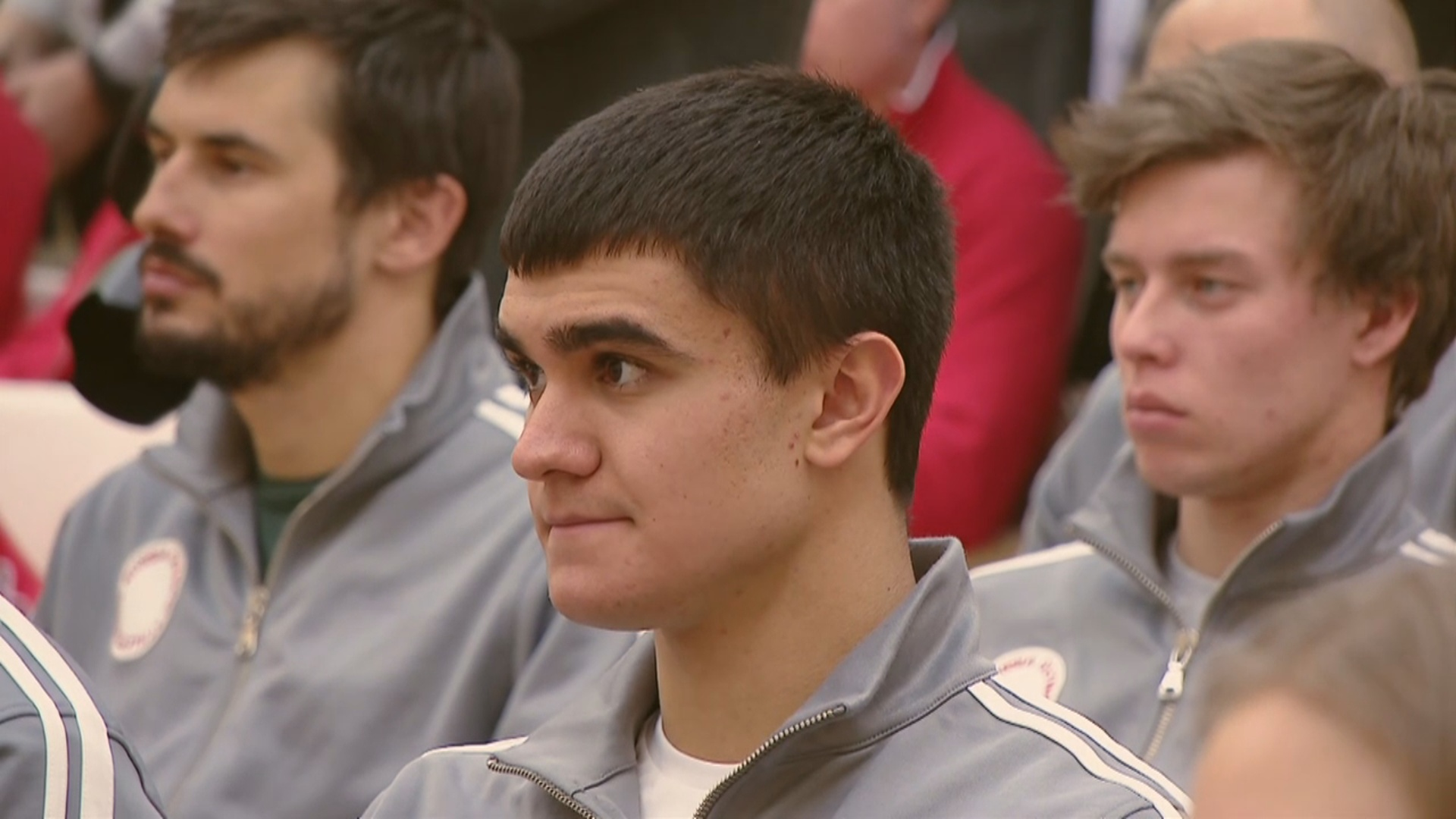 Российские спортсмены – участники XXIII Олимпийских зимних игр 2018 года в Пхёнчхане во время встречи с Президентом России Владимиром Путиным